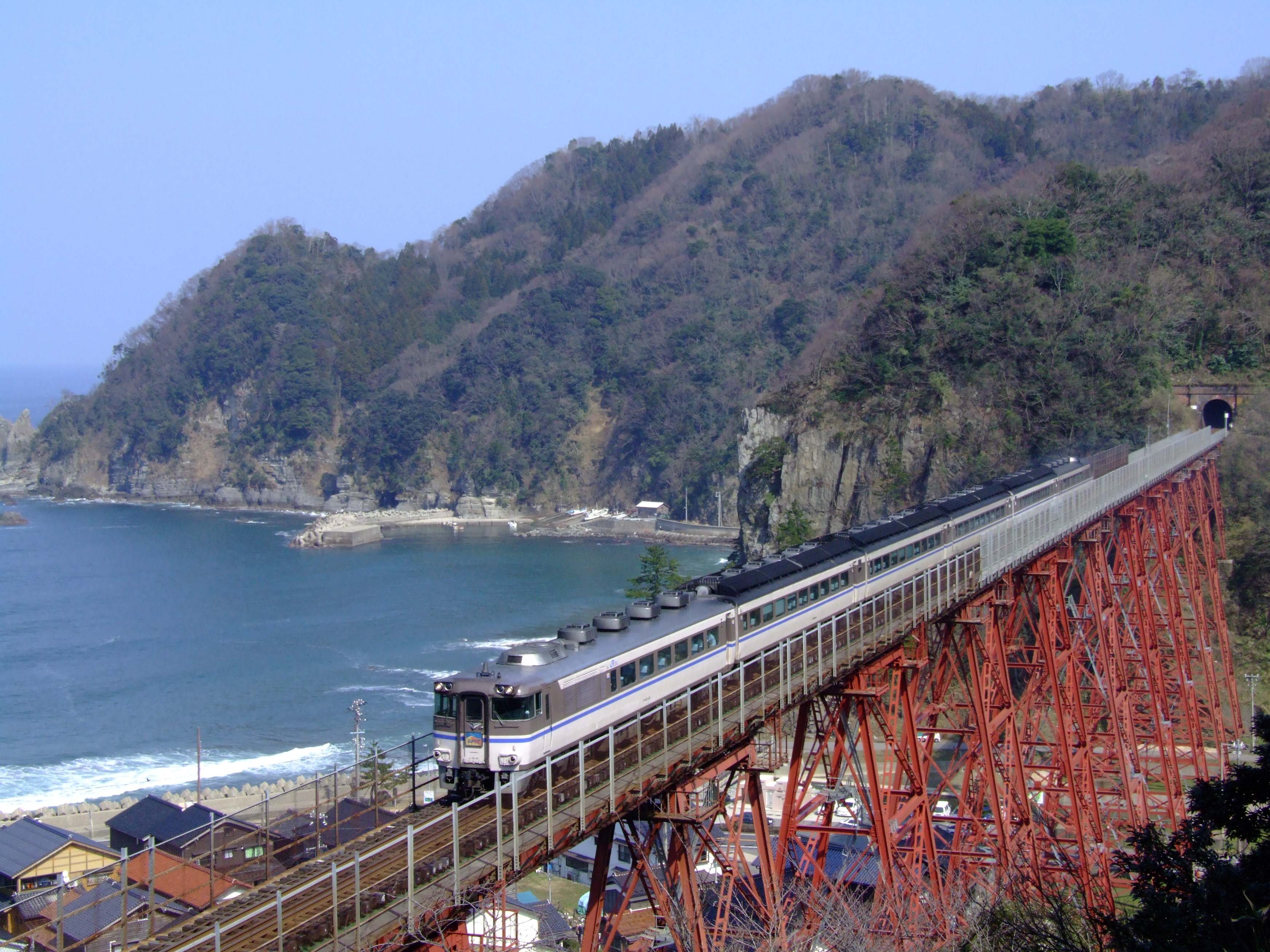 餘部駅の撮影ポイントより。特急「はまかぜ」の通過中を収めたショット。